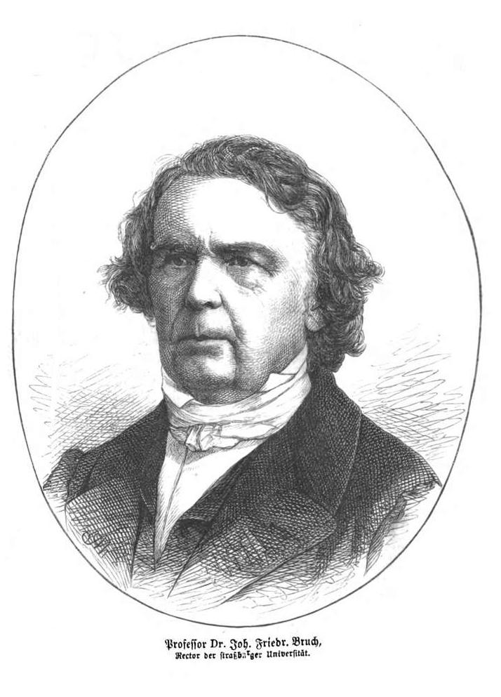 Johann Friedrich Bruch 1792-1874), deutscher Theologe, Rektor der Universität Straßburg.